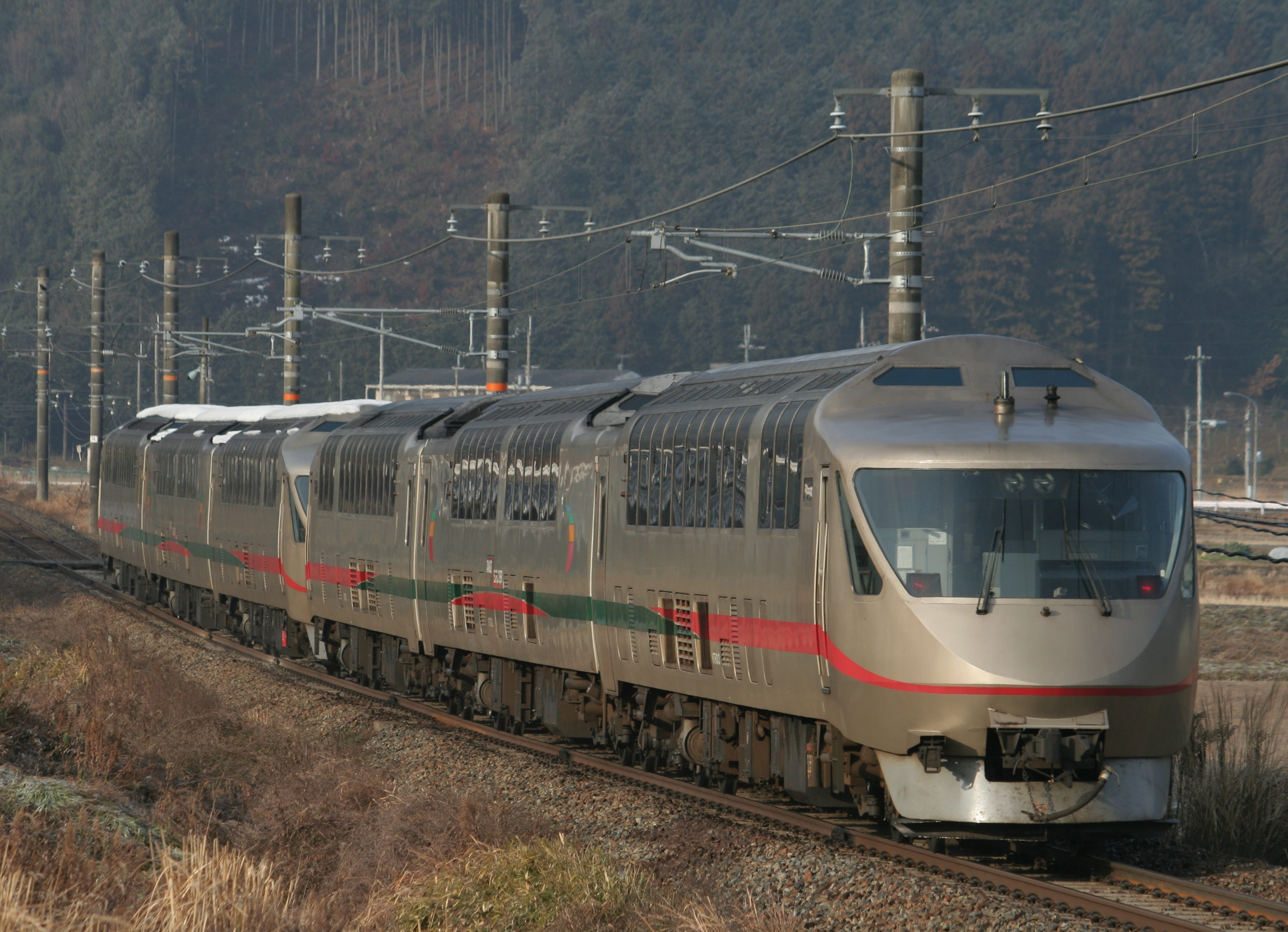 タンゴエクスプローラーで運用されているKTR001形気動車。（JR福知山線、黒井 - 市島）